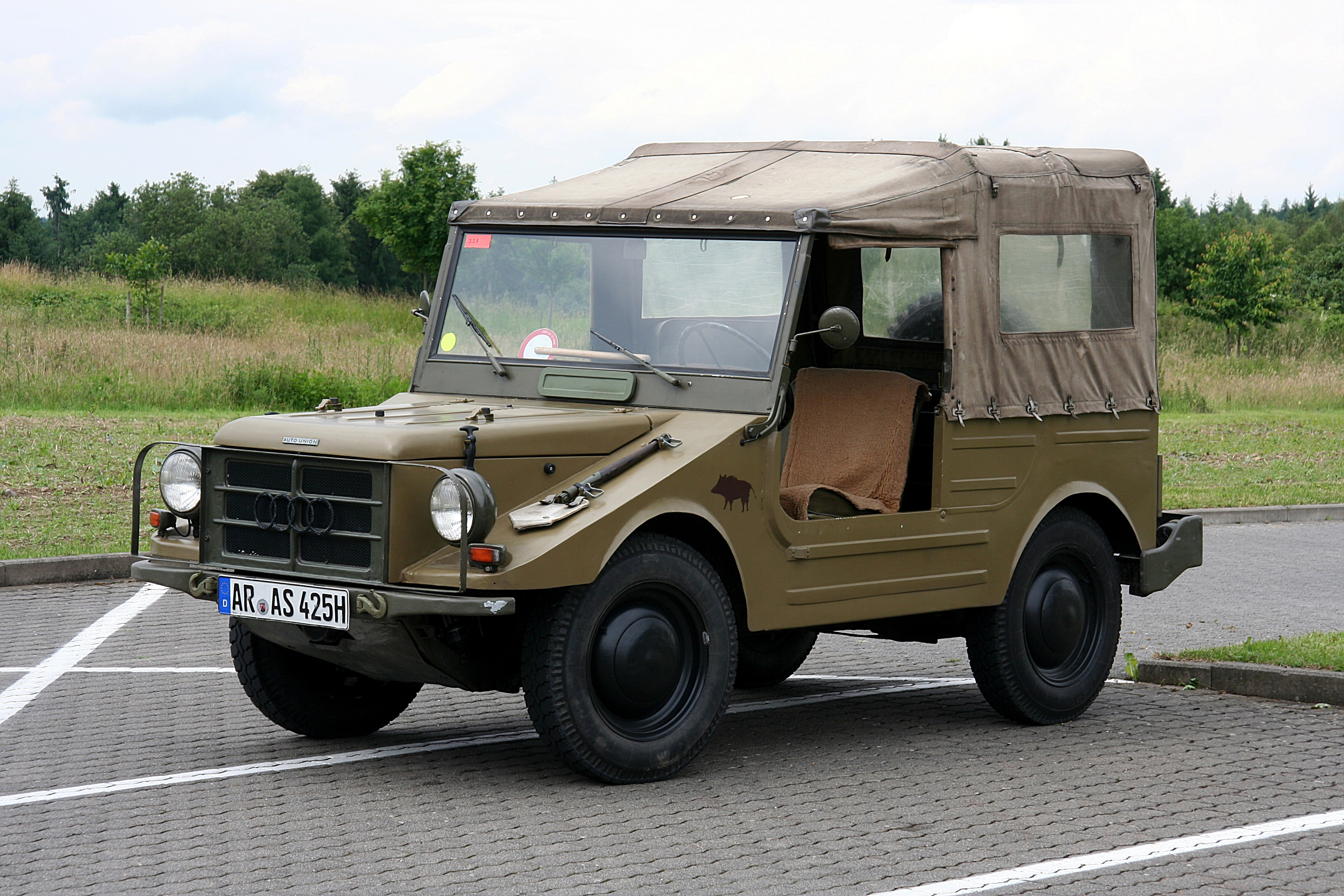 Auto Union Munga (Mehrzweck-Universal-Geländewagen mit Allradantrieb), gebaut von 1956 bis 1968